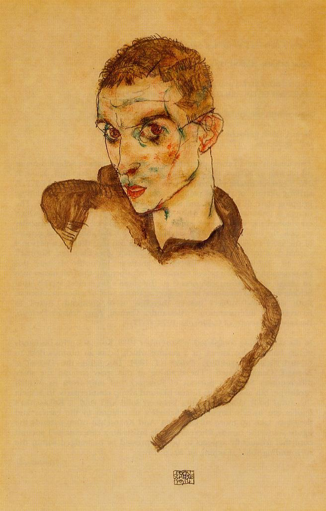 Self-portrait